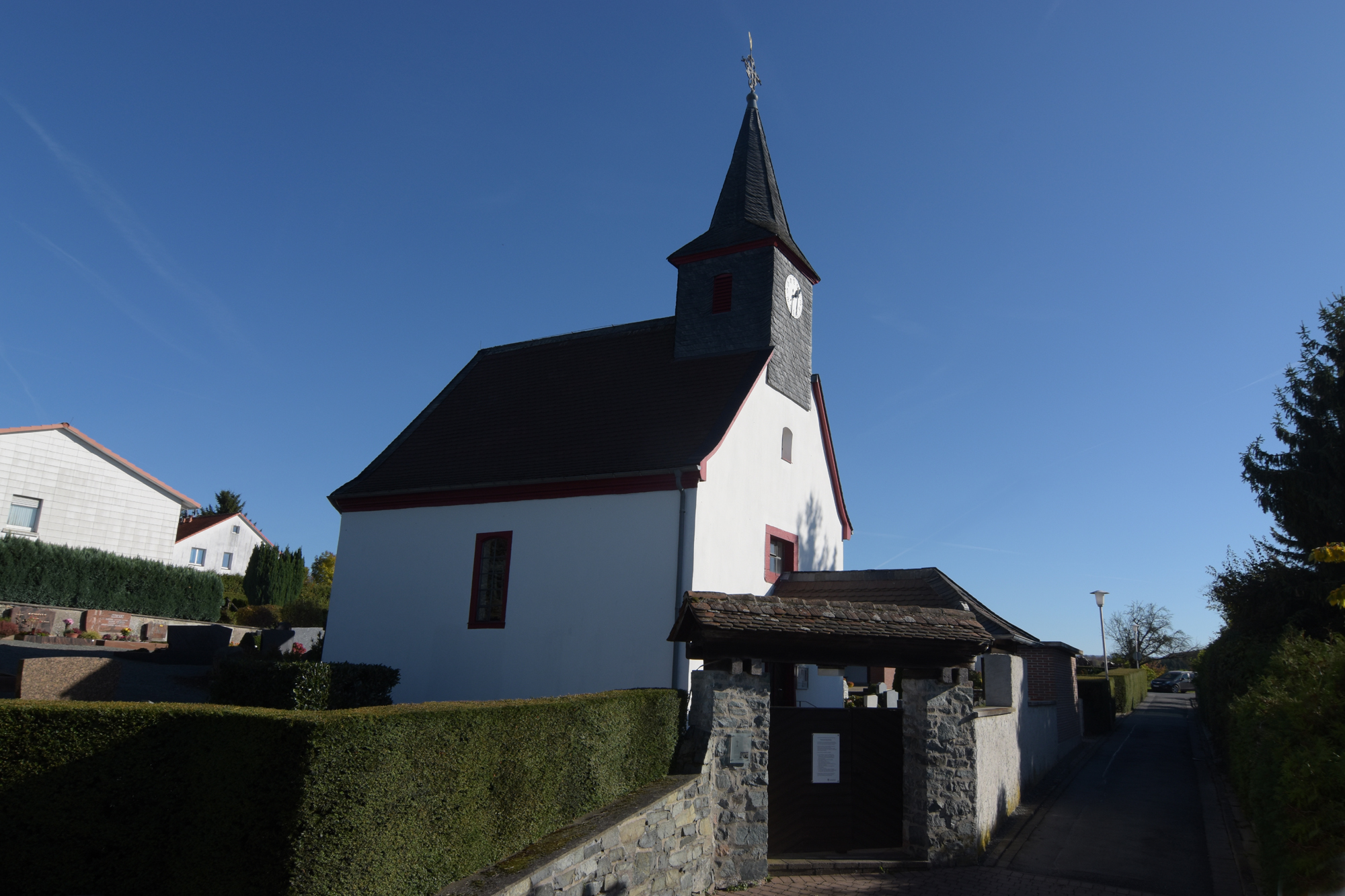 Denkmalgeschützte evangelische Kirche in Mühltal-Frankenhausen, Römerweg 5a